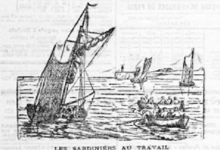 Les sardiniers au travail (dessin paru dans le journal "La Croix" du 21 janvier 1903 pour illustrer un article d'Henry Reverdy intitulé "Les pêcheurs de sardines", qui évoque la crise de la sardine dans le Pays bigouden et particulièrement à Penmarc'h en 1903)